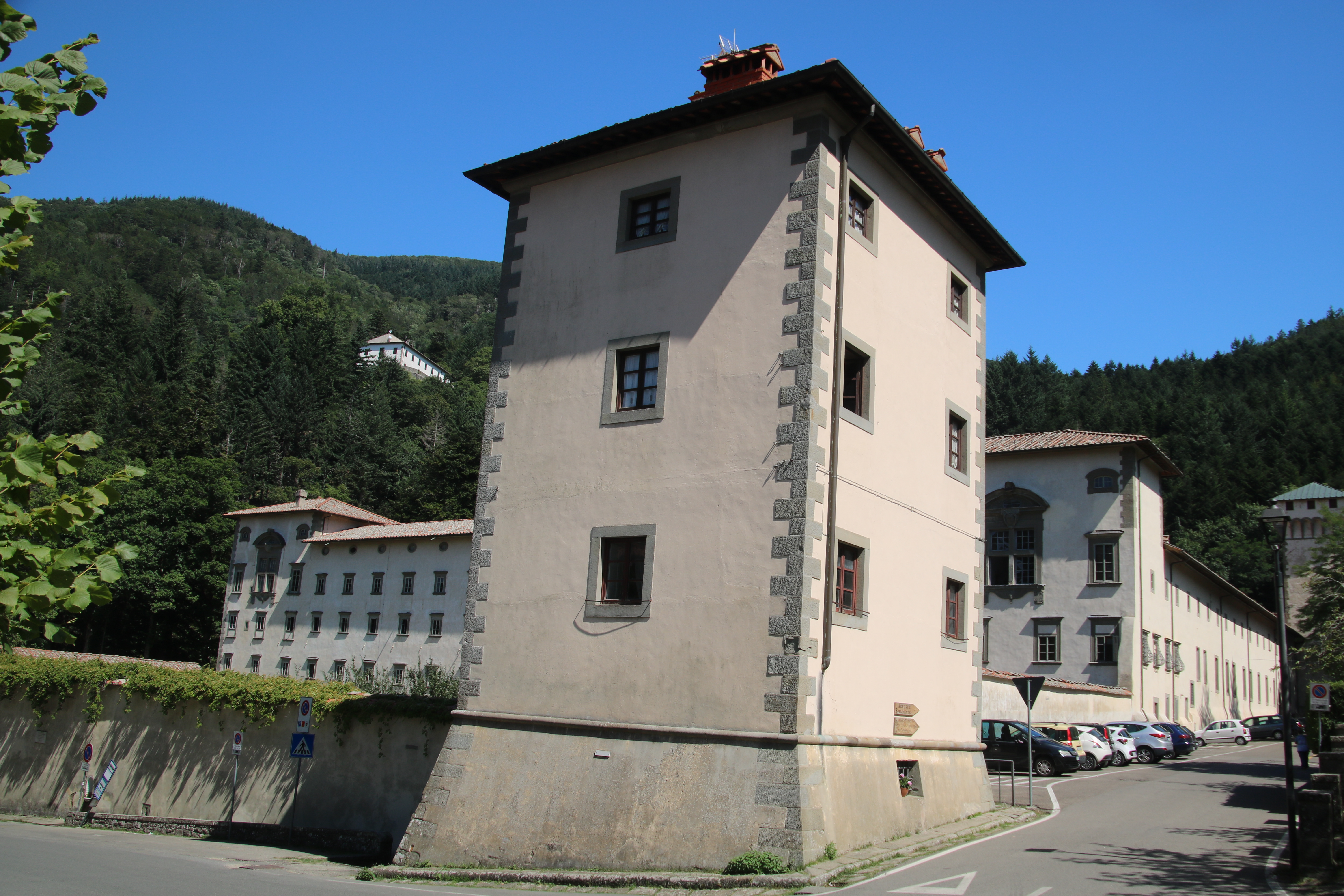 Via Ghibellina, Reggello, Vallombrosa, Abbazia di Vallombrosa